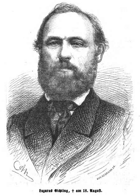 Lazarus Sichling, deutscher Kupferstecher im 19. Jh.